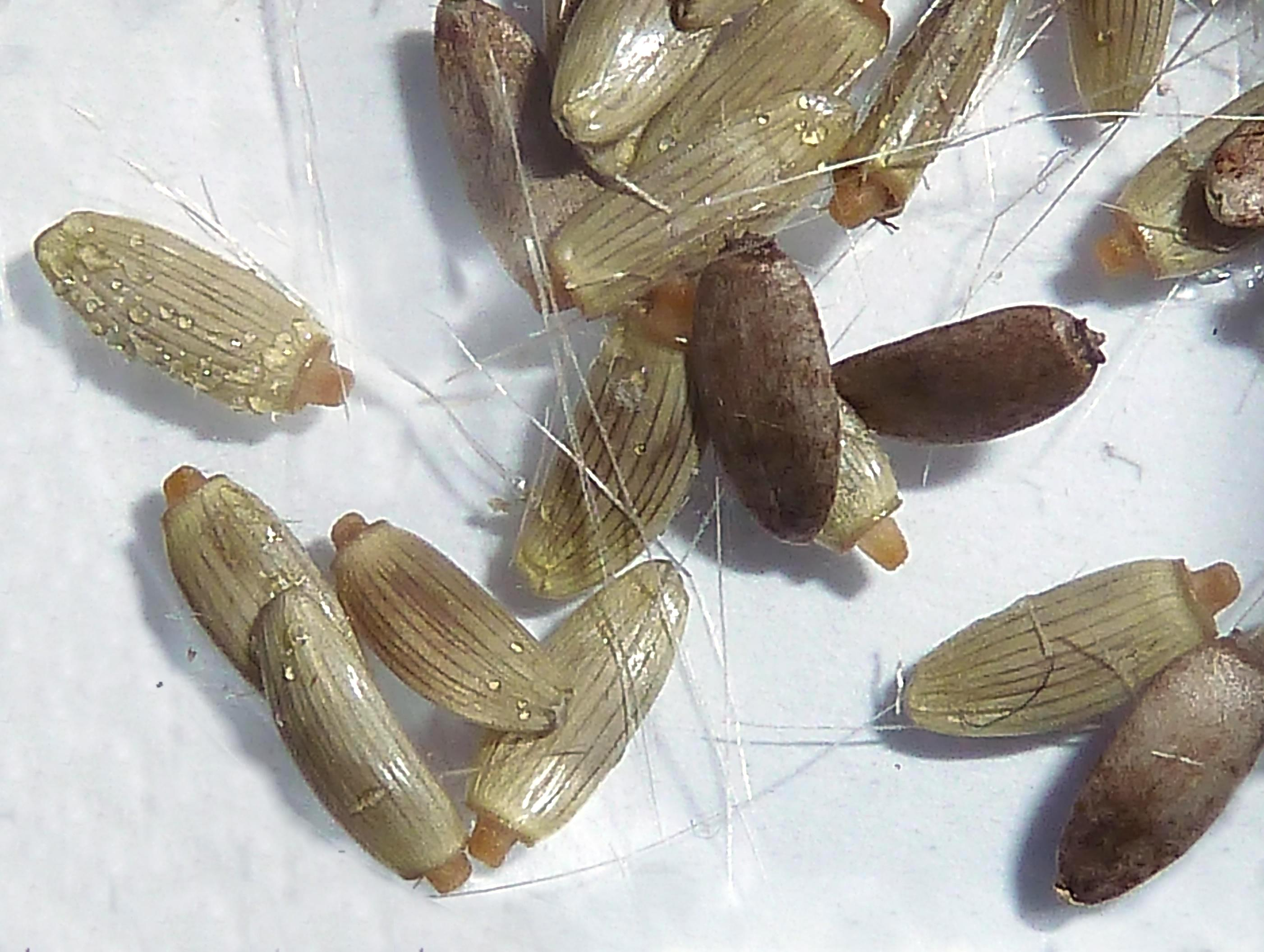 Carduus pycnocephalus (Cardo, cardo borriquero, cardo negro) - Cipselas sueltas desprovistas de su vilano caedizo en bloque: noten las gotas de liquido pegajoso exudado. Descampado circa Biblioteca, Albatera (Provincia de Alicante, España).